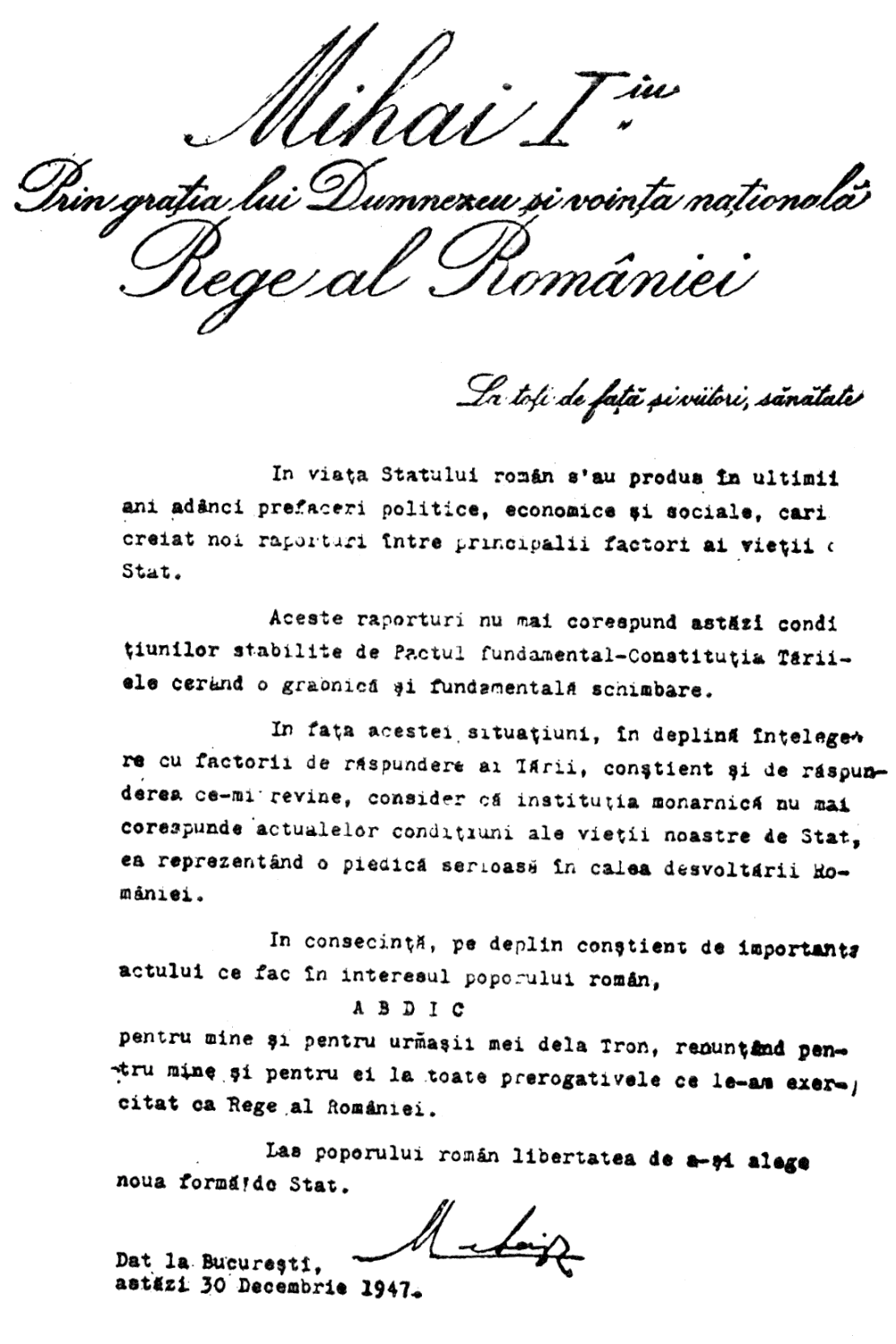 Abdication act of Mihai IFull text at Wikisource (in Romanian): wikisource:ro:Actul de abdicare a regelui Mihai I